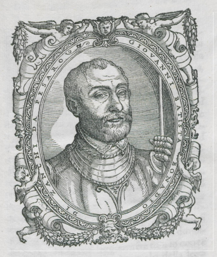 Del modo di fortificar le città